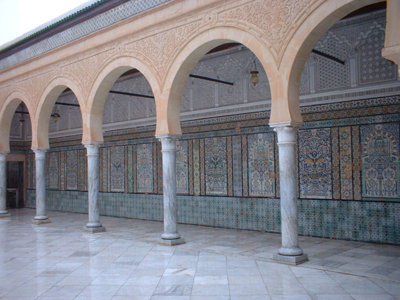 Photographie personnelle prise à Kairouan (Tunisie). Décorations de la cour du sanctuaire de la mosquée du barbier